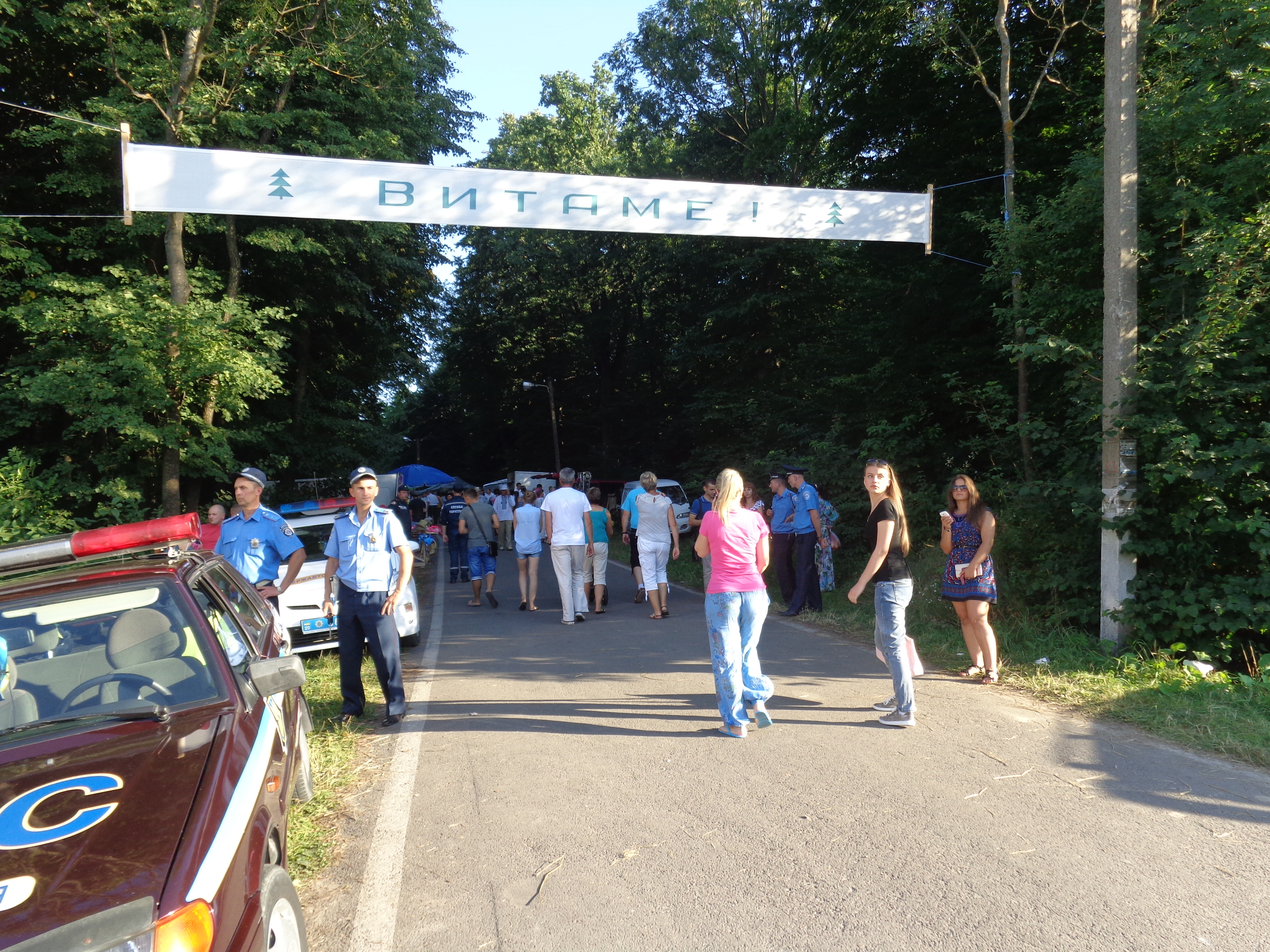 В'їзд на фестиваль "Дзвони Лемківщини".